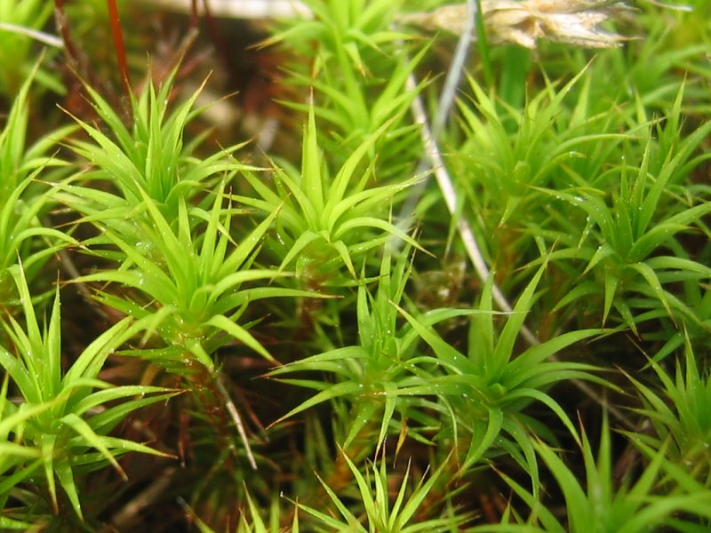 Steifblättriges Widertonmoos (Polytrichum strictum), Zingst, weibliche Pflänzchen